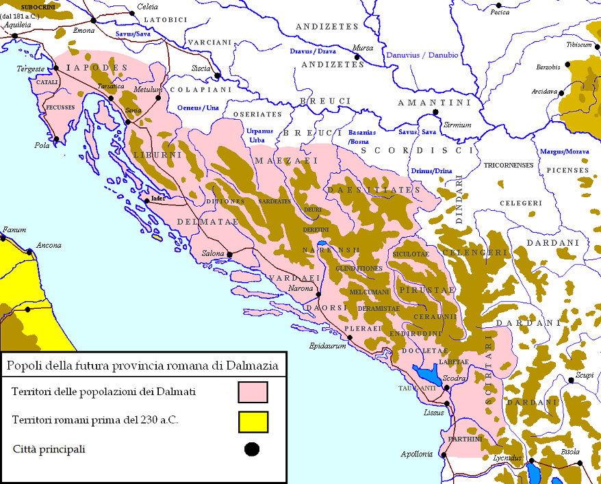 I popoli della Dalmazia pre-romana